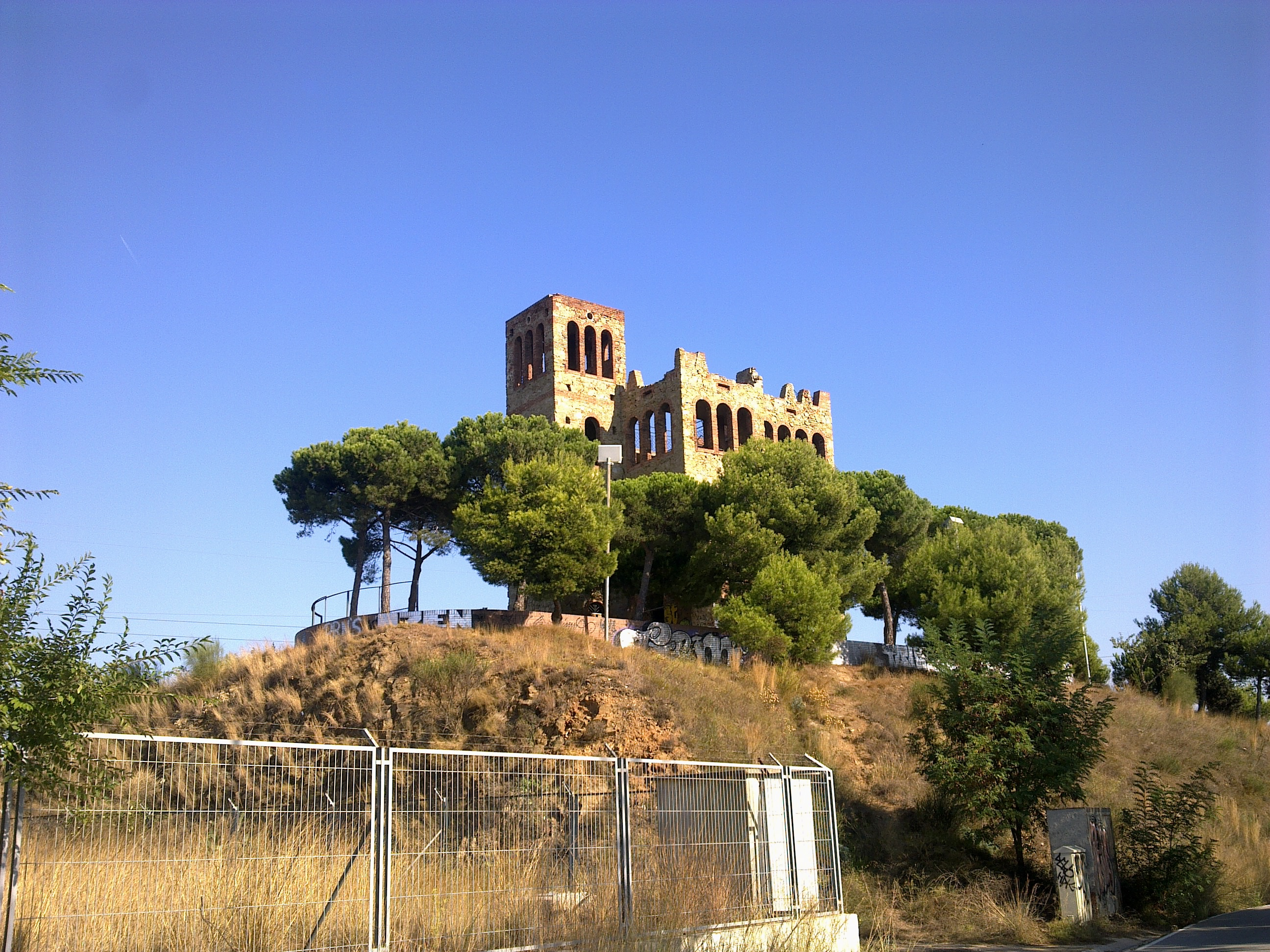 Barcelona